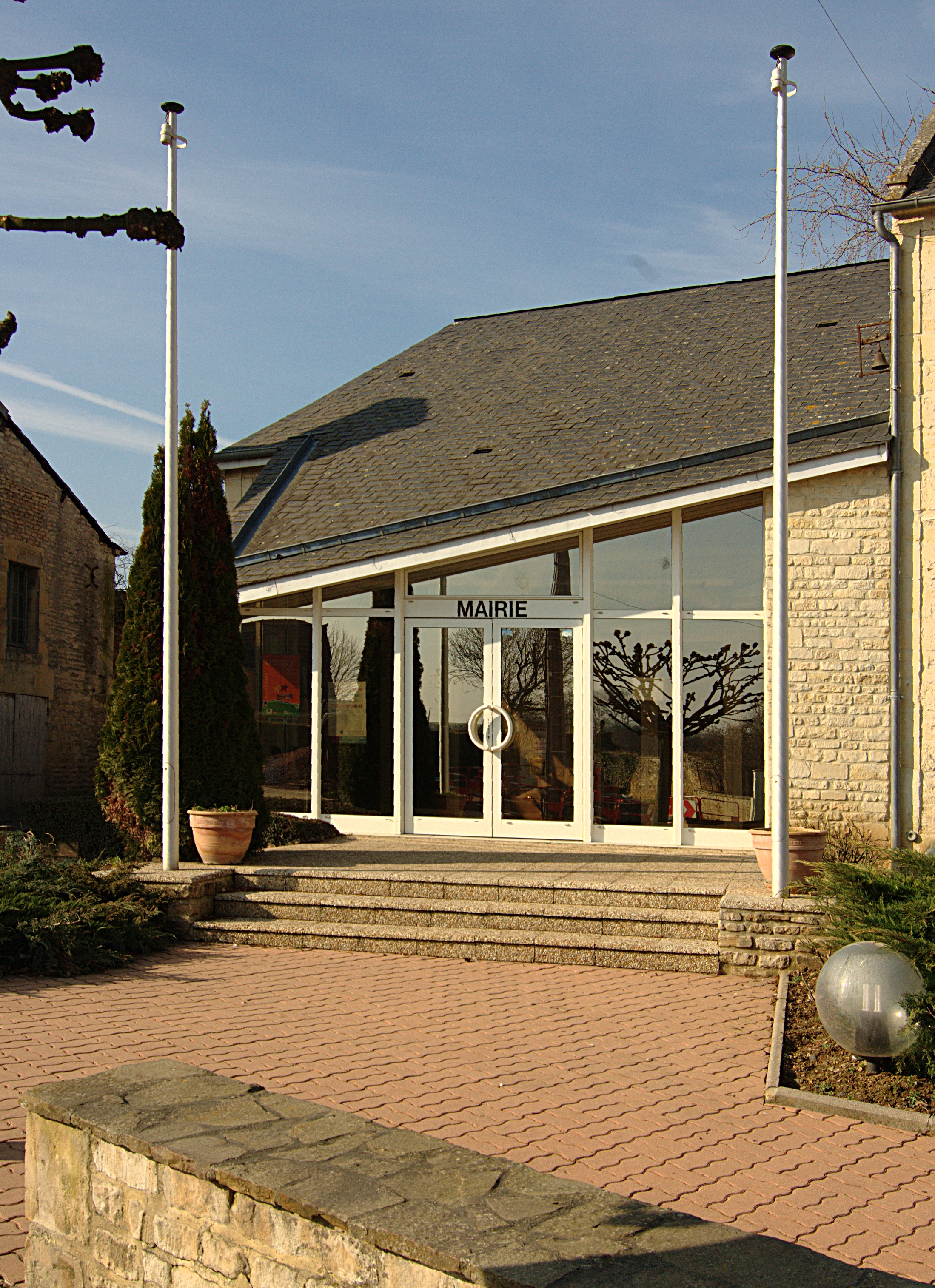 La Mairie de LAIZE-la-VILLE, village de France,Calvados.